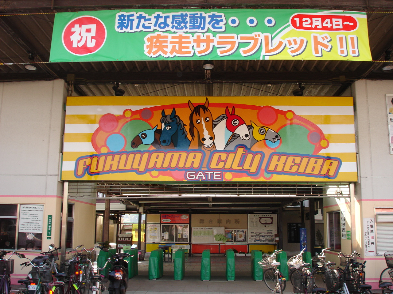 広島県福山競馬場（2005年11月 Setouchi撮影）